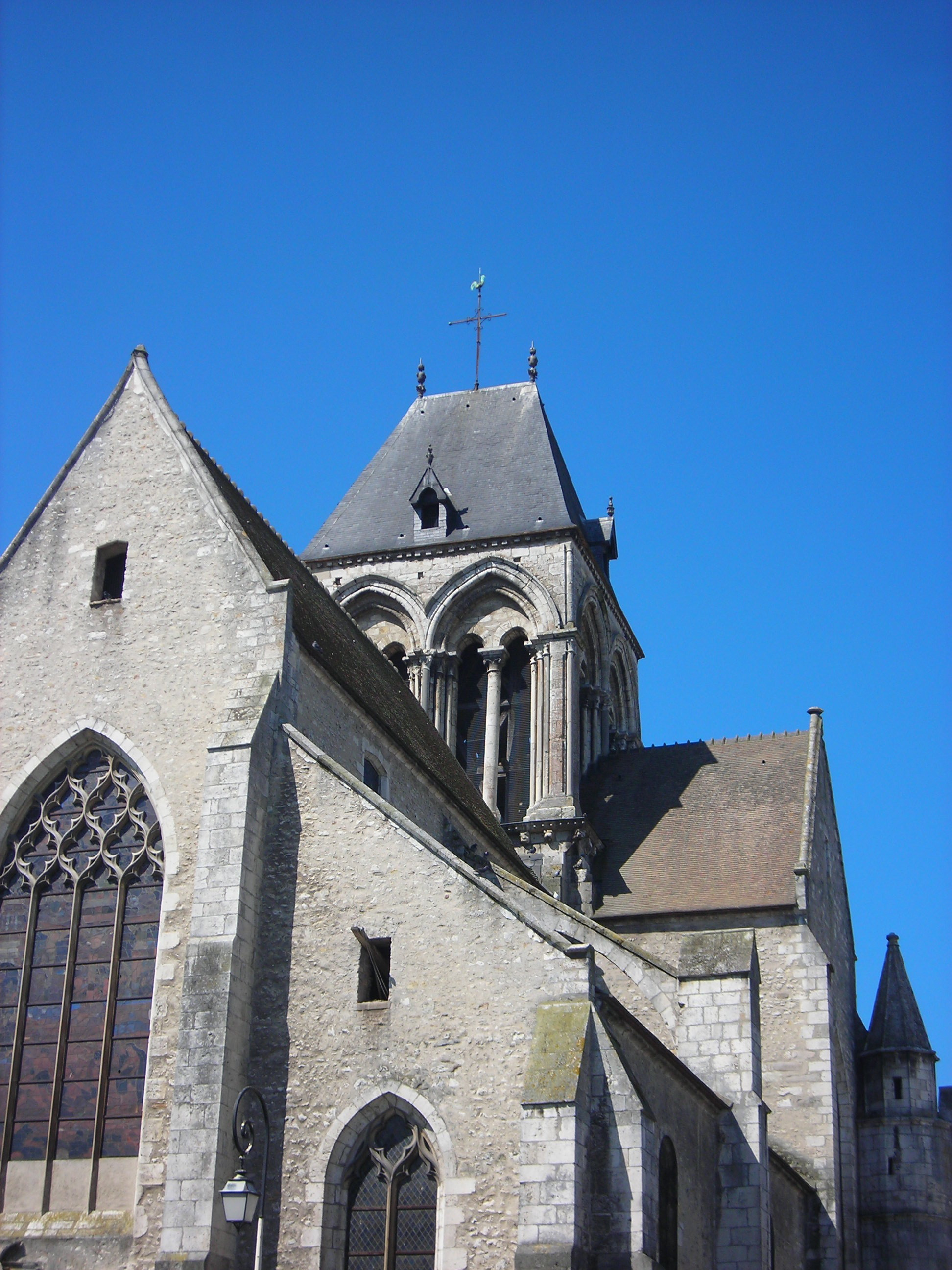 Étampes